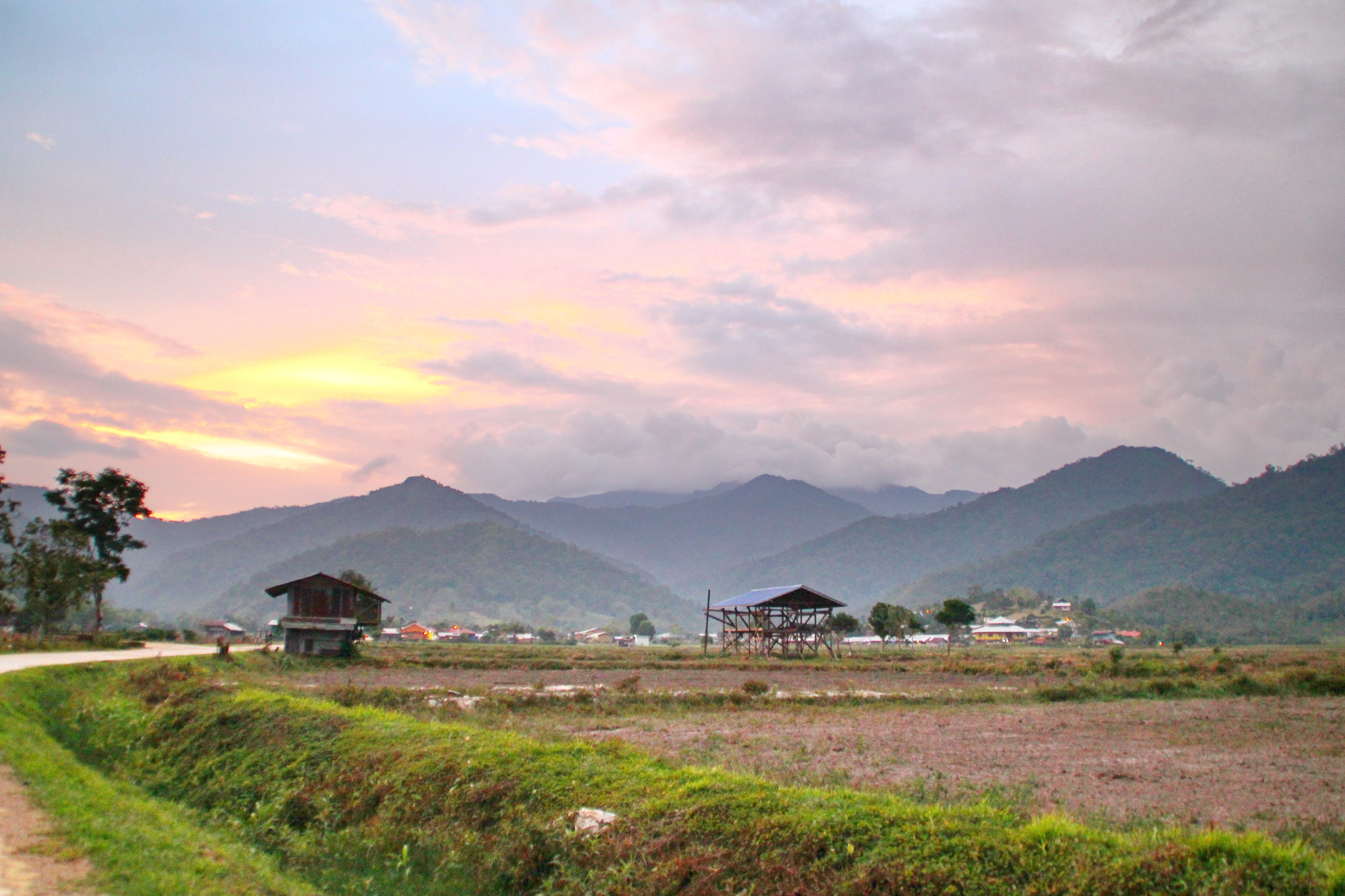 Rural Evenings